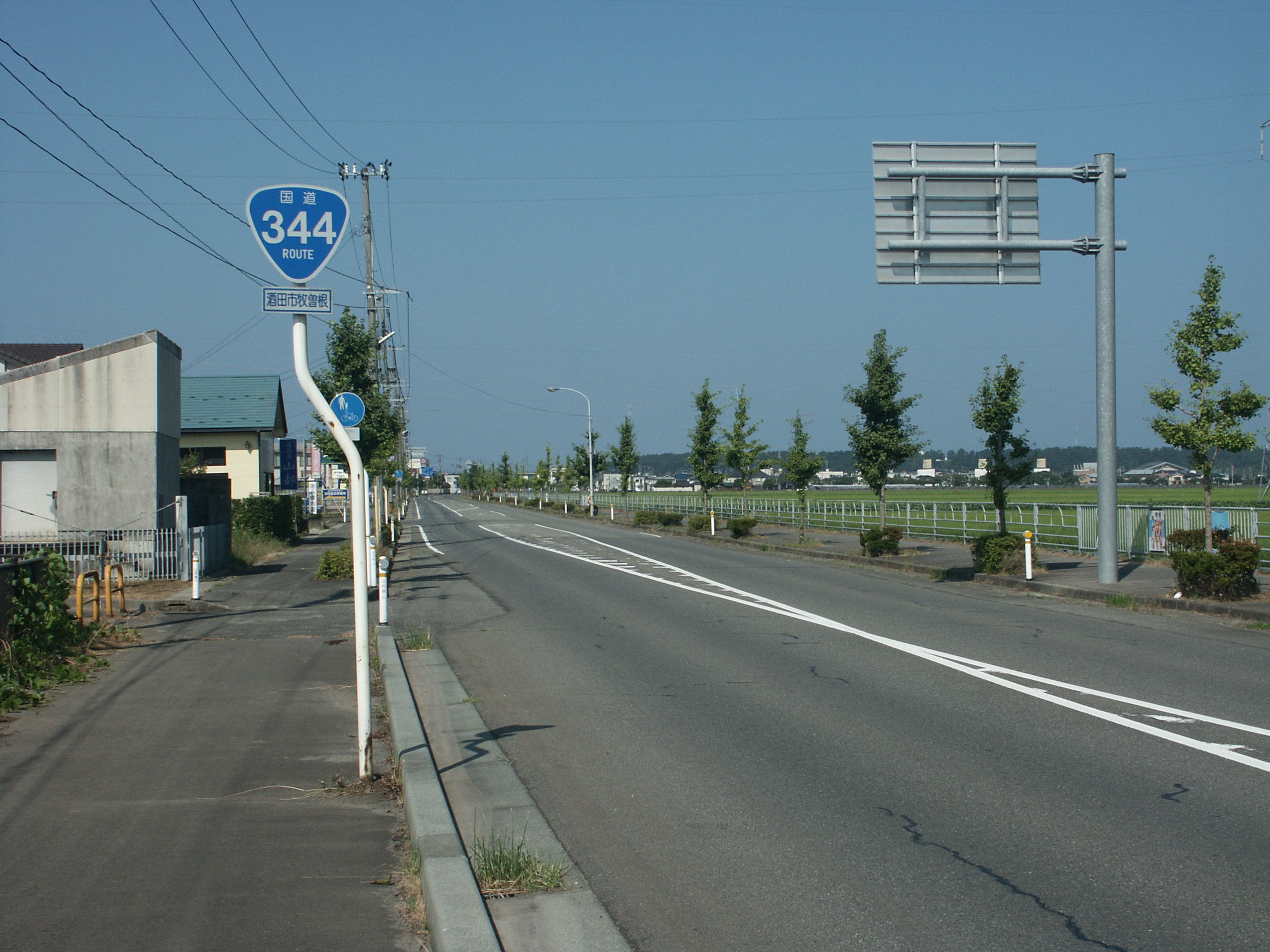 国道344号線山形県酒田市牧曽根付近